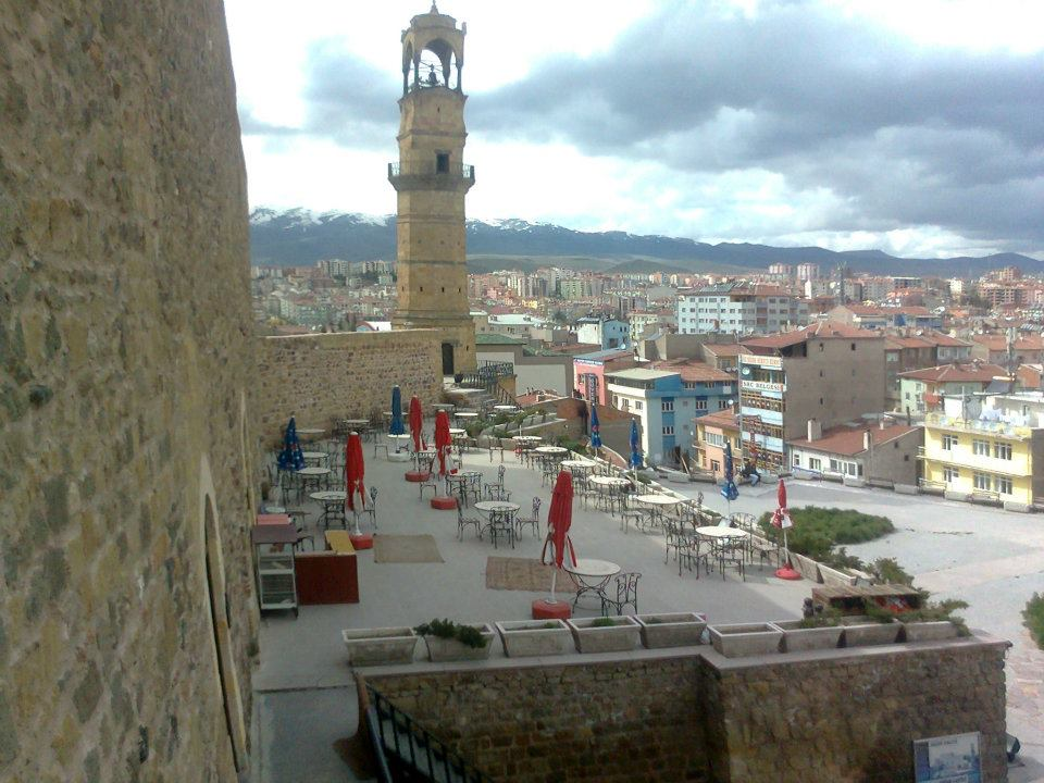 niğde UFUK MERAL